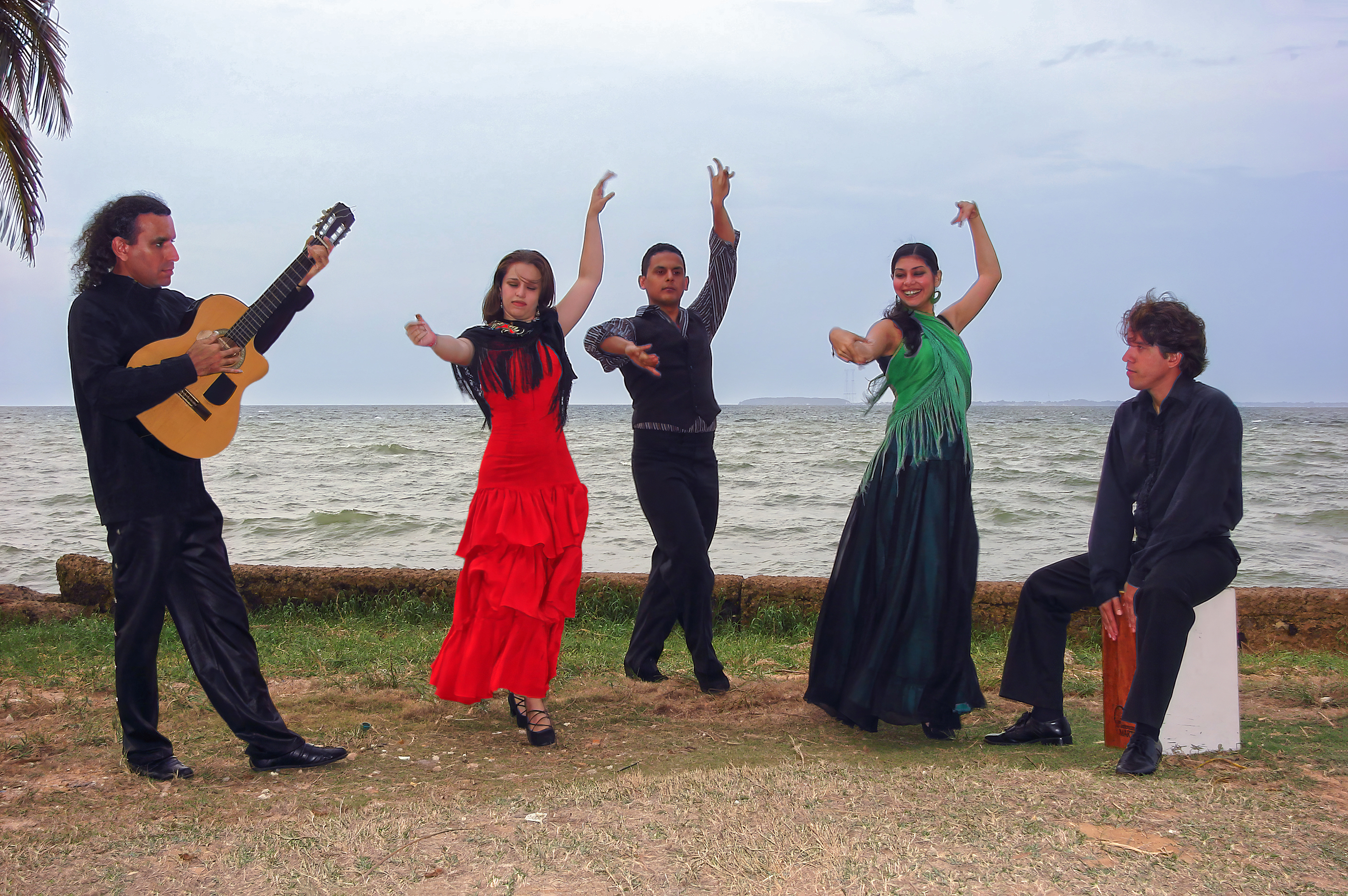 Grupo Texera de Música española en Maracaibo